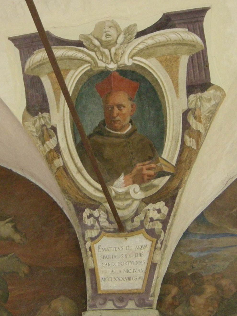 Chiostro di ognissanti, personalità francescane 09 matteo d'acquasparta